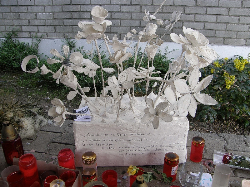 Bilder der Albertville-Realschule aus Winnenden